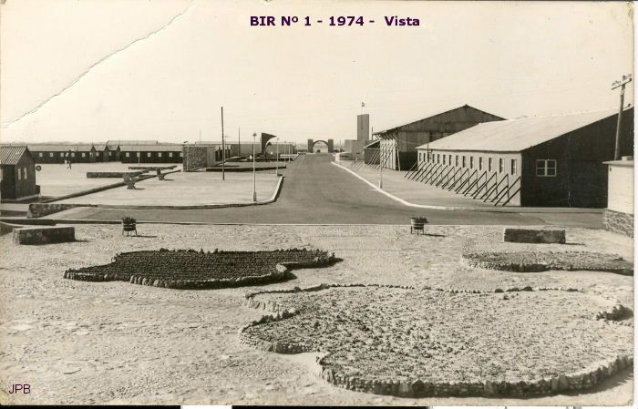 Fotografía del BIR Nº1 desde el fondo de la avenida.